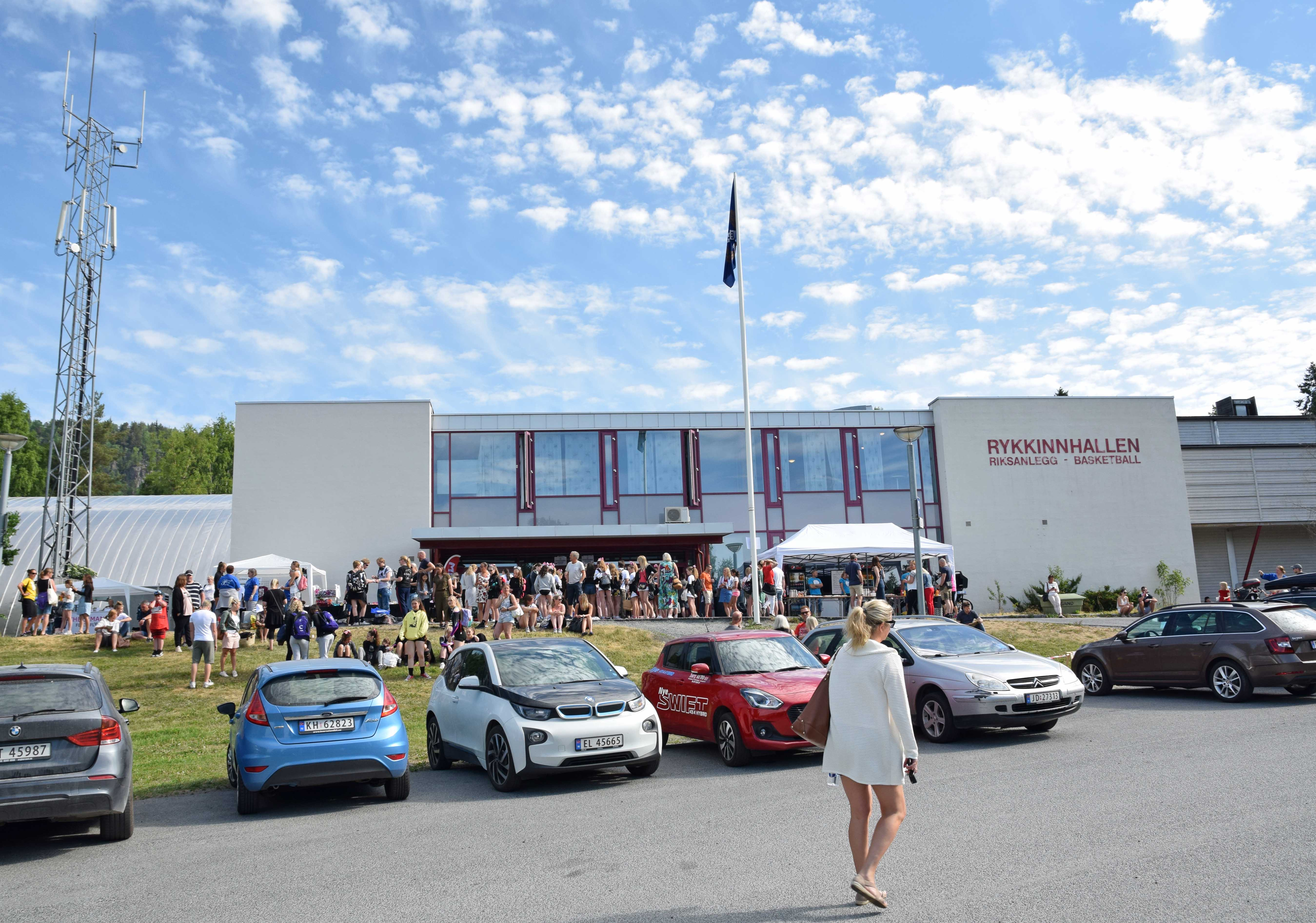 Rykkinnhallen, 9. juni med Cheerleading & Cheerdance Summer Open 2018